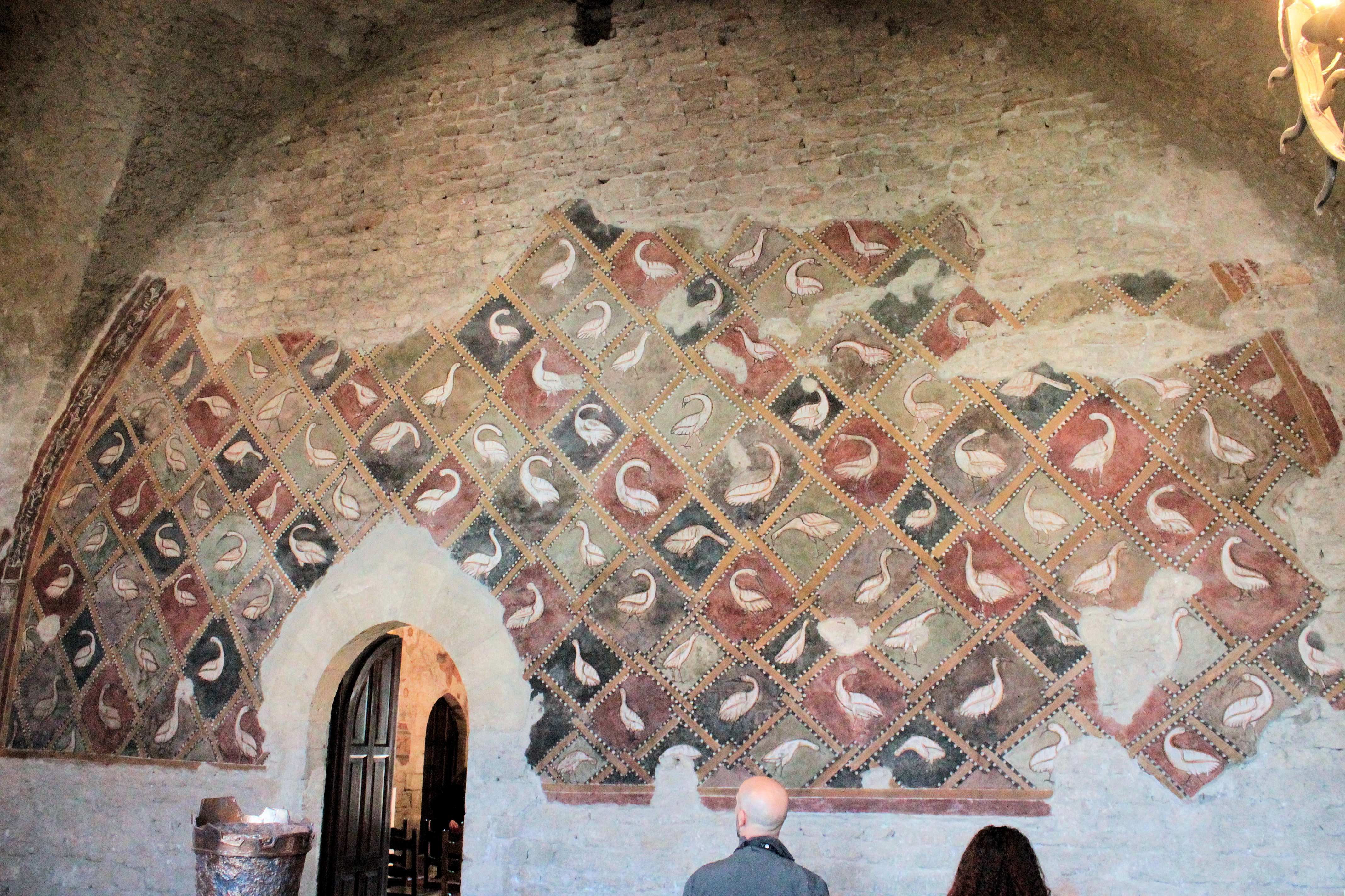 Sala delle Oche, foto scattata in occasione dell'editathon tenutosi ad Anagni (FR) il 29-30 aprile 2017